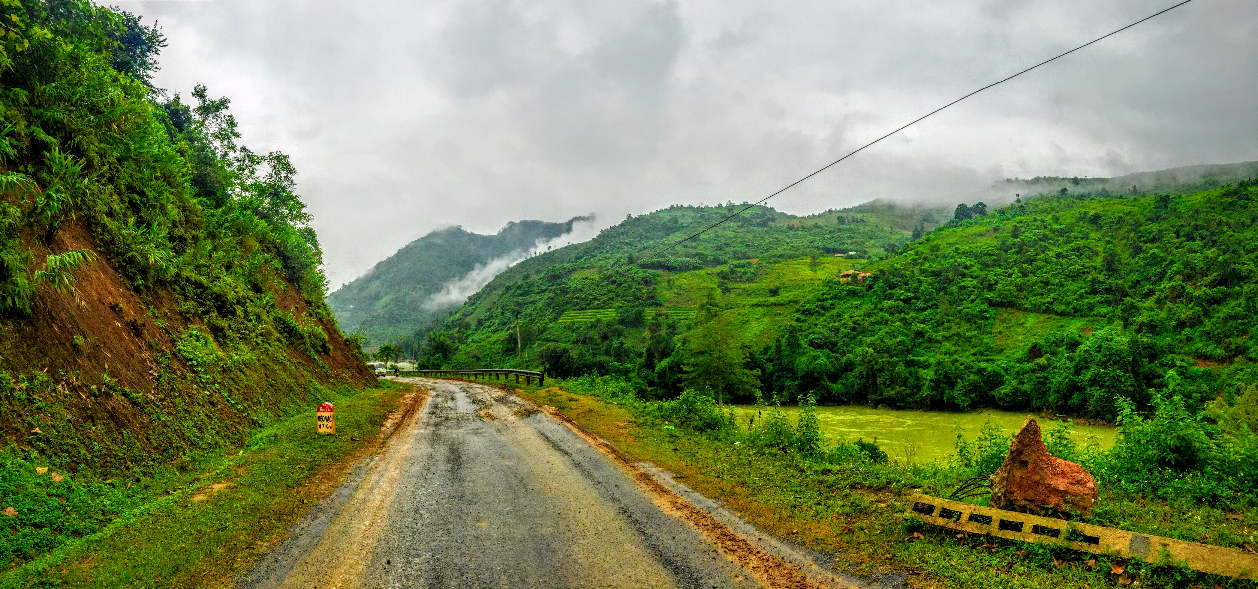 Lý Bôn, Bảo Lạc, Cao Bằng, Vietnam